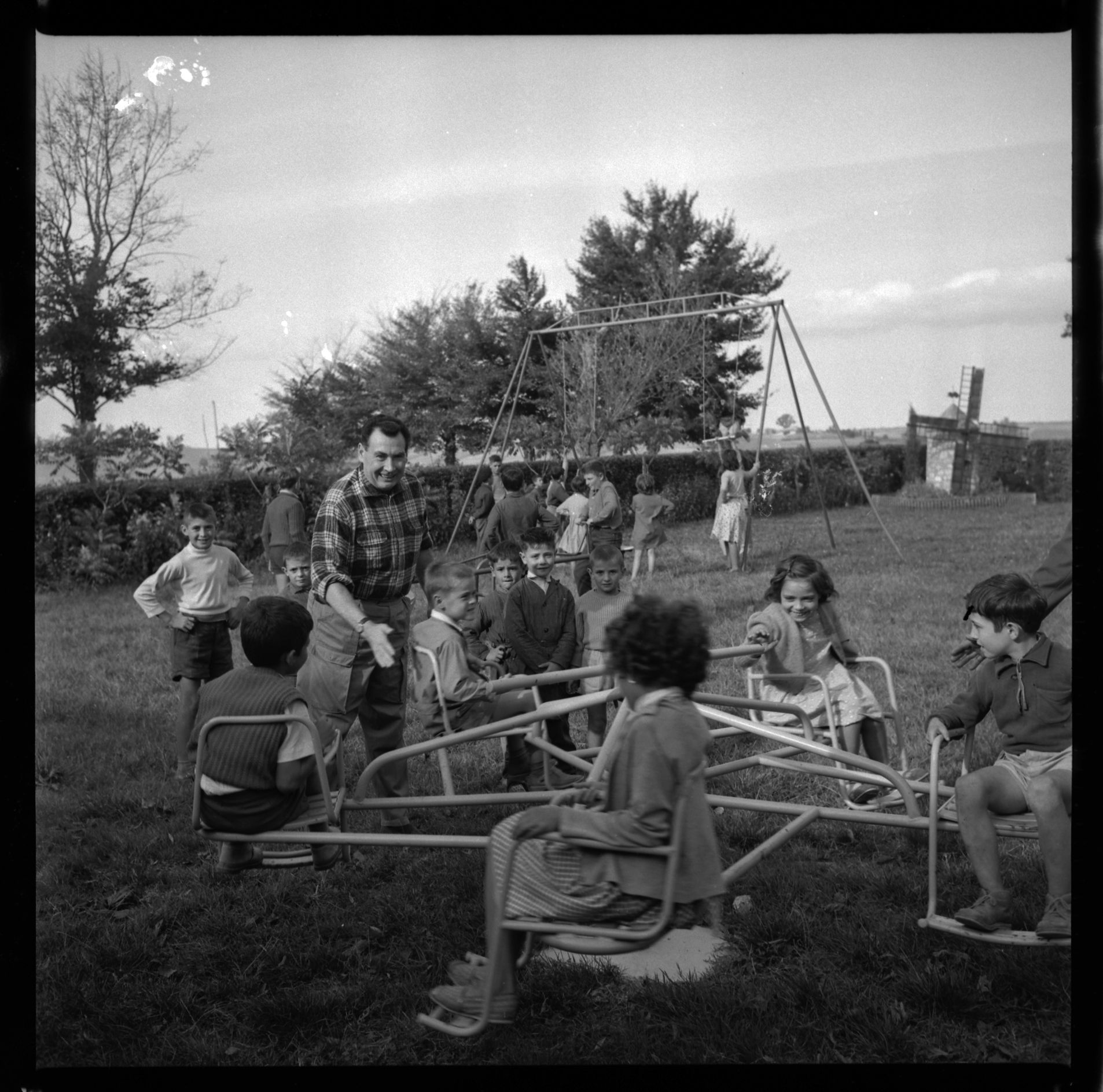 Gauré (Haute-Garonne). 10 octobre 1962. Vue d'Edouard Duleu dans sa propriété avec des enfants.